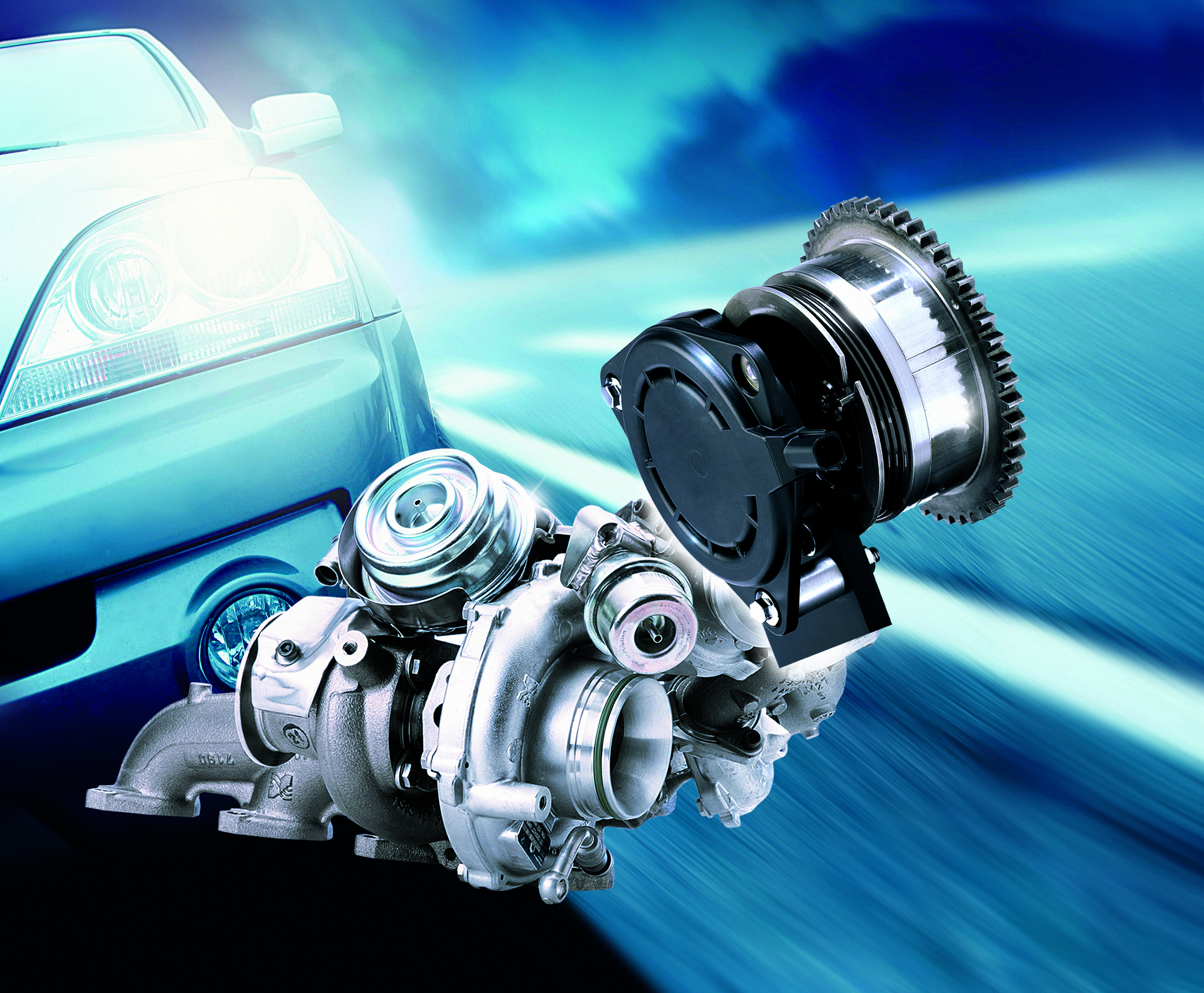 automotive